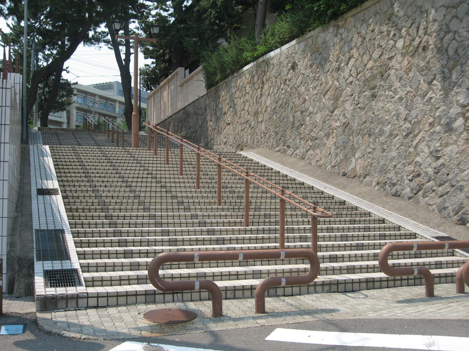 新潟市中央区。しょうこん坂の画像。